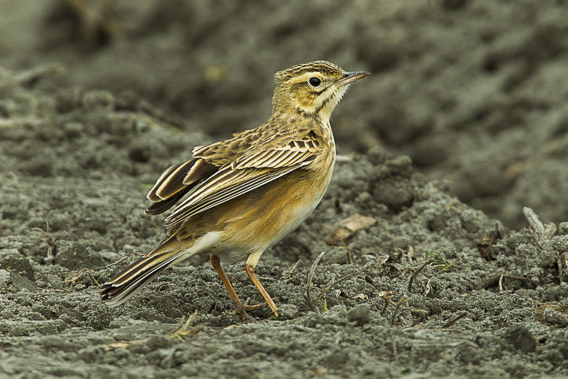 Oriental Skylark - Taiwan_S4E0159